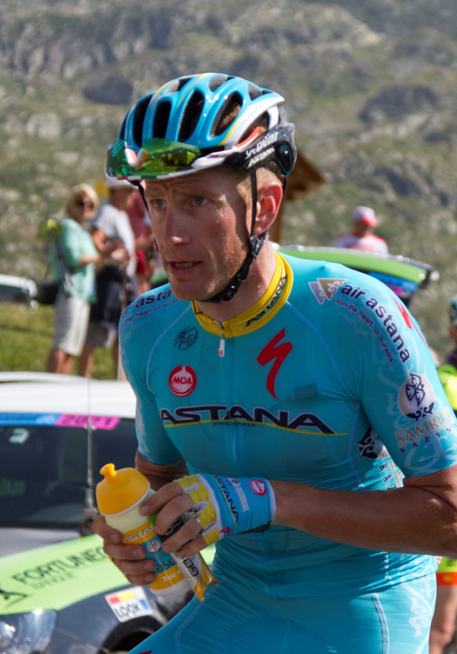 096 westra